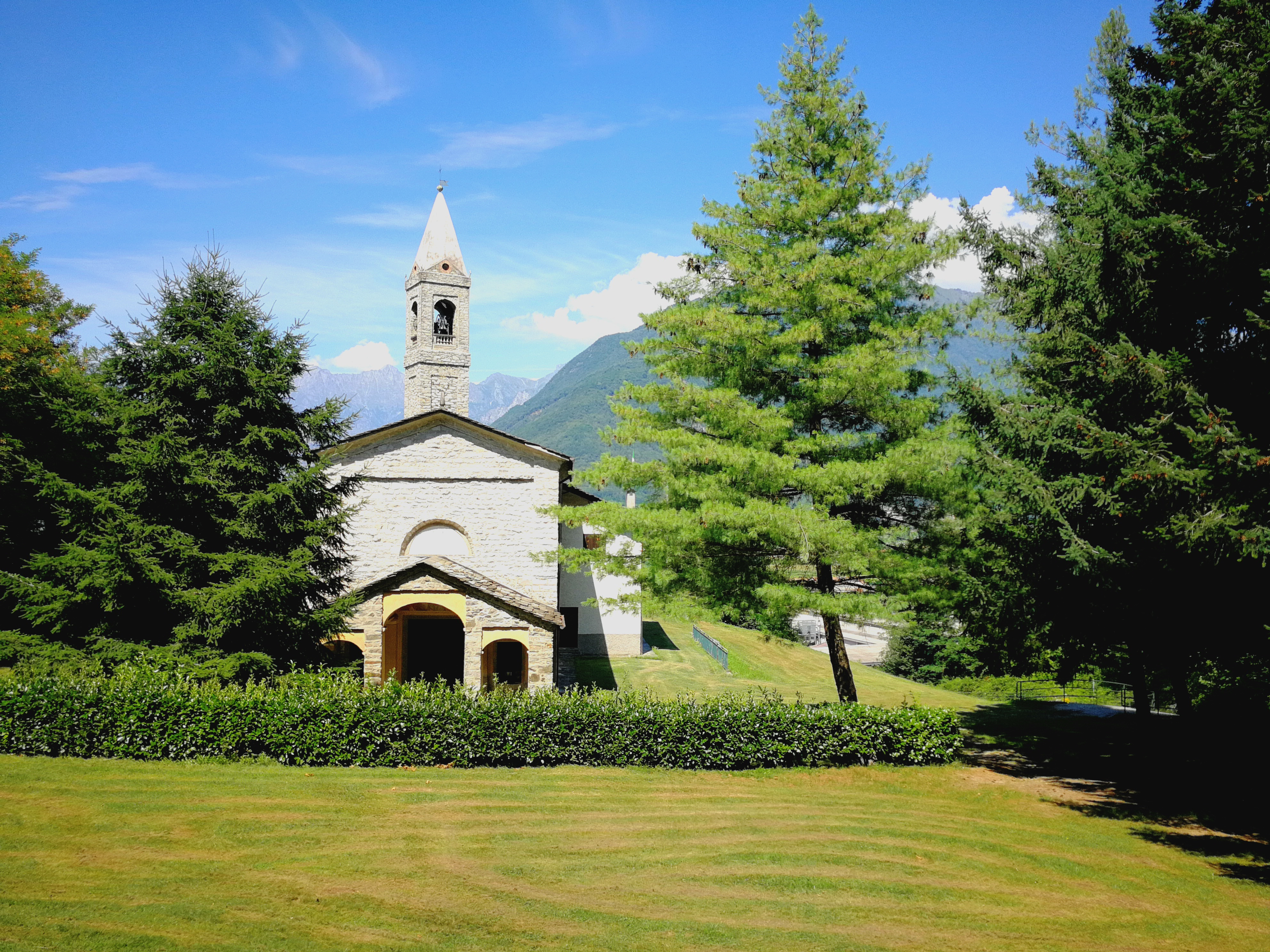 Chiesa della Madonna di Valpozzo